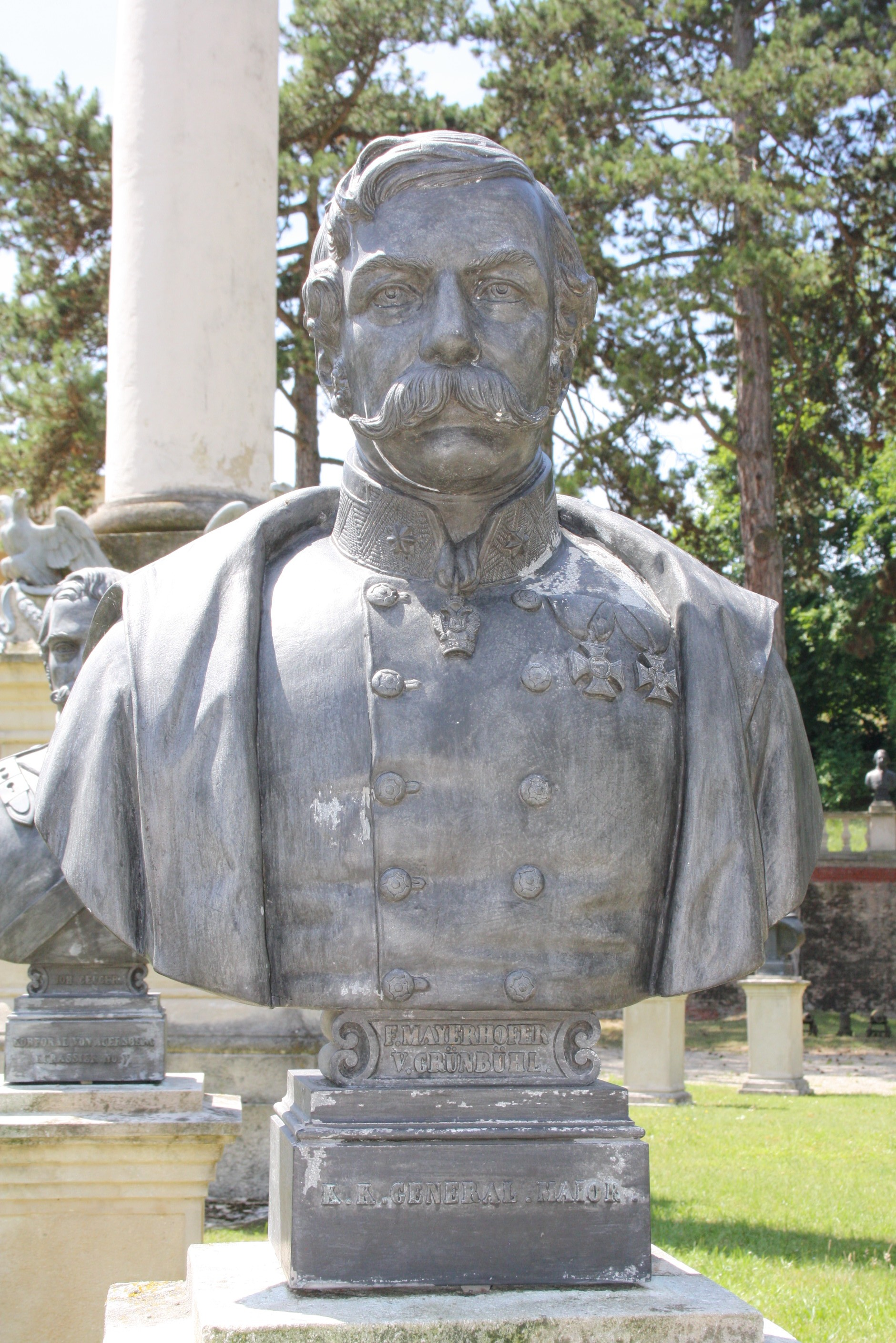 Büste in der Gedenkstätte Heldenberg (Niederösterreich)